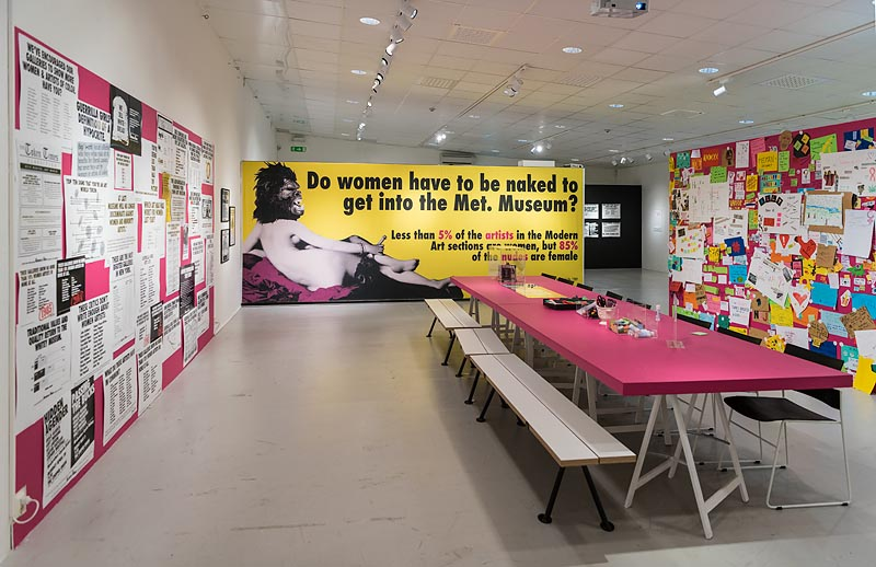 mjellby konstmuseum interiör 2019 guerrilla girls